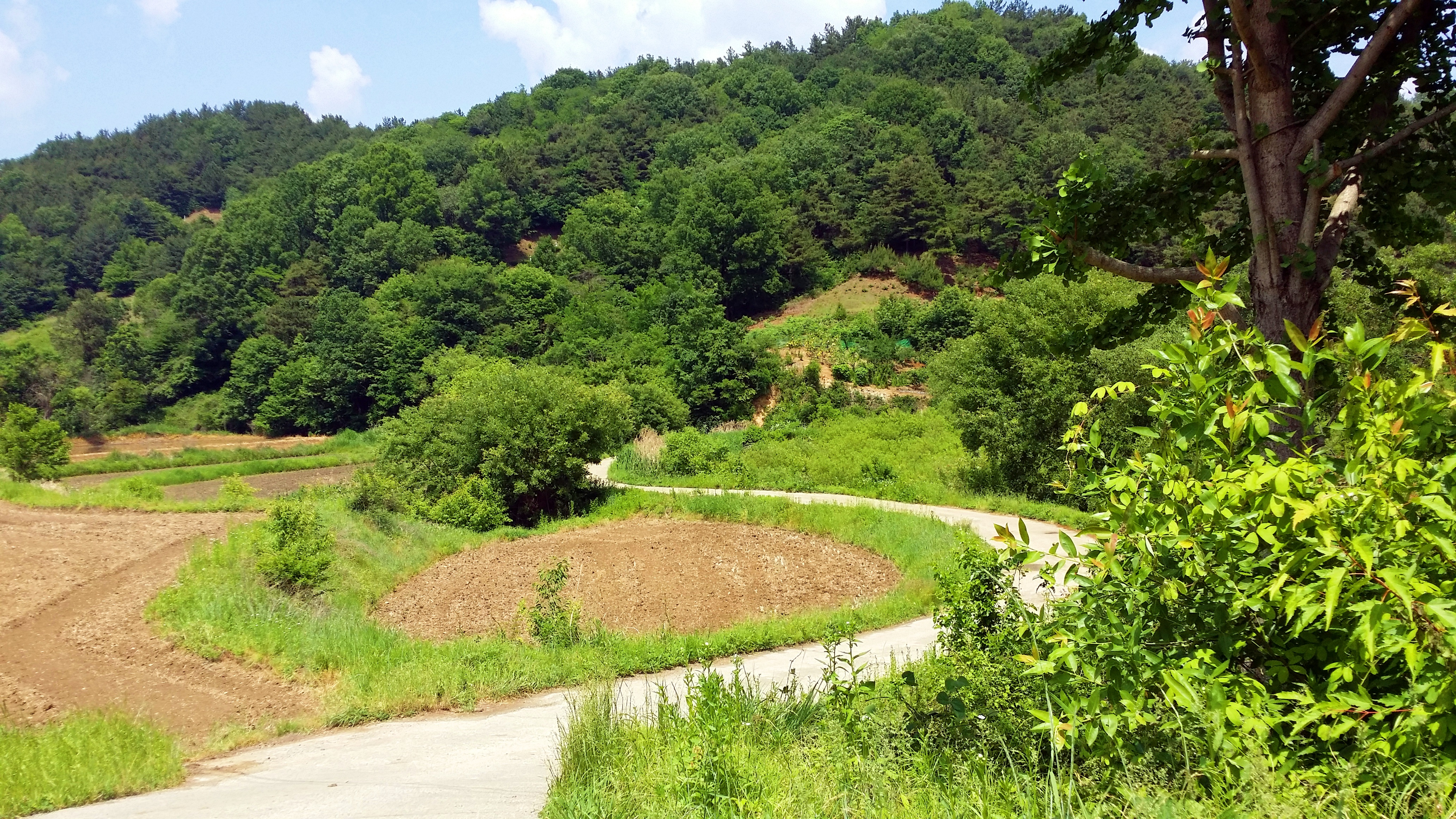 대청호오백리길 3구간